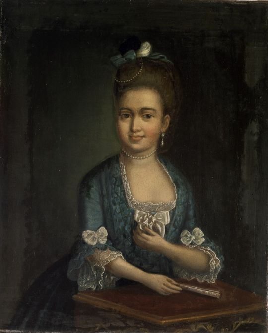 Portræt af Støvlet-Cathrine (Cathrine Benthagen), ca. 1765